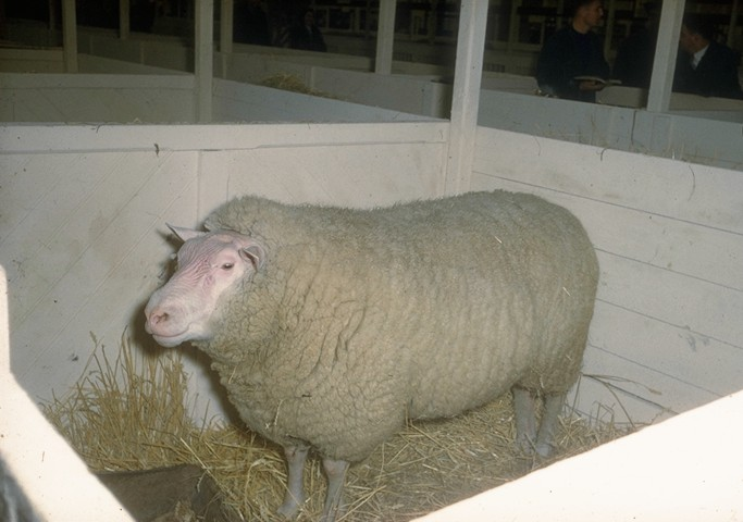 Bélier Cotentin photographié au Concours général agricole de Paris vers 1960